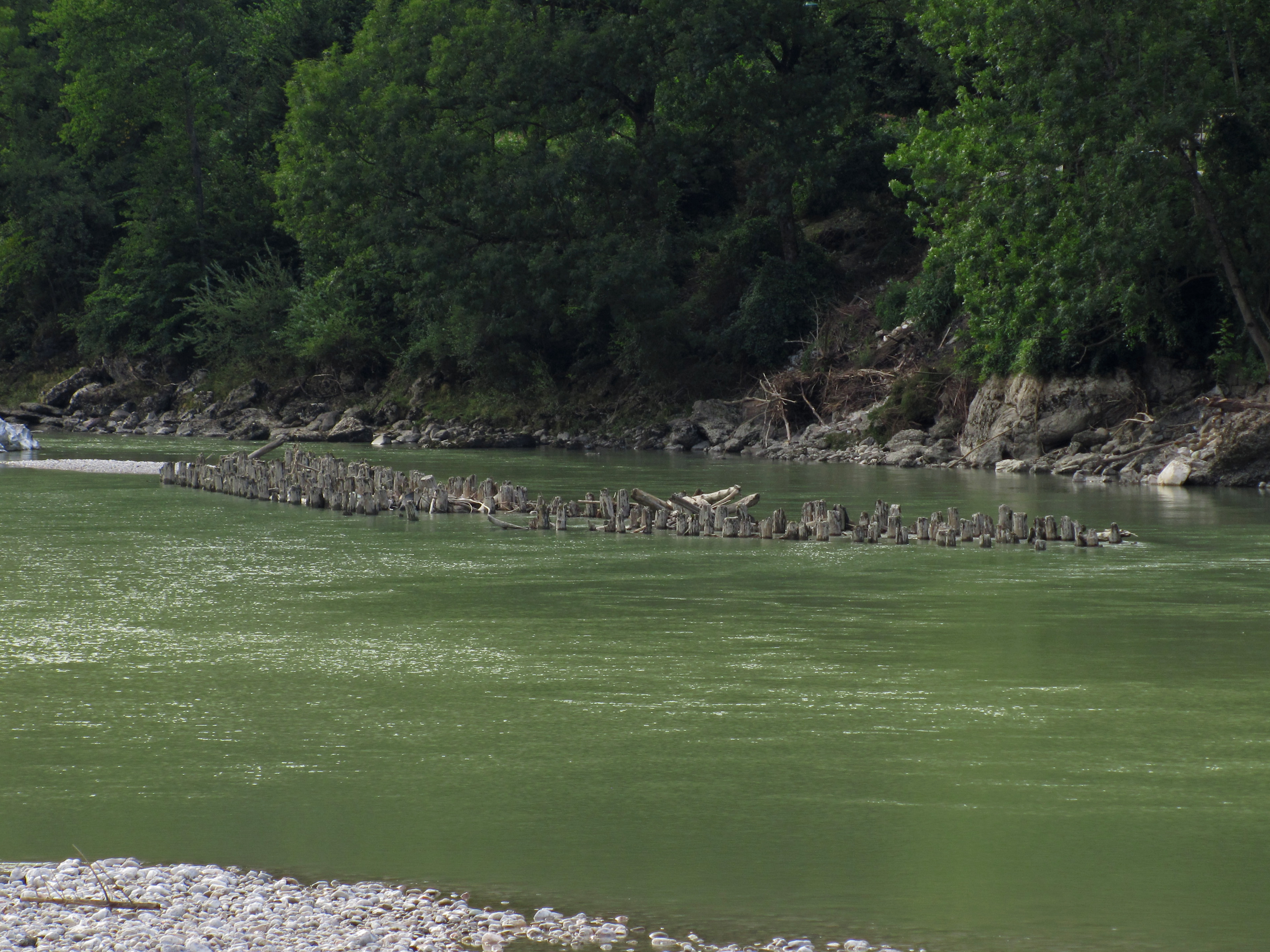 Der Hieflauer Rechen wurde erstmals 1502 auf Anordnung Kaiser Maximilians gebaut, um auf der Enns abwärtstriftende geschlägerte Baumstämme aufzufangen. Nach mehreren Hochwässern, die den alten Rechen zerstört hatten, erteilte Erzherzog Karl 1574 den Auftrag, einen neuen Rechen zu bauen. Dieser war 252 Meter lang und 11 Meter breit, und es war ihm ein 25 Meter langer Nebenrechen vorgelagert. Mit Wasseraufzügen, die man mittels Wasserrad bzw. in wasserarmen Zeiten durch ein Drehkreuz betrieb, hob man die Hölzer an Land, zerkleinerte sie und baute daraus Holzkohlenmeiler - bis ins Jahr 1800 liegende, sog. Langmeiler, später stehende, sog. Rundmeiler. Die Holzkohle wurde in den Eisenerzer Blähhäusern und Radwerken zur Roheisenerzeugung genutzt, später auch in Hieflauer Hochöfen. Gegen Ende des 19. Jahrhunderts verlor die Holzkohle durch die Umstellung auf Koks an Bedeutung, im Jahr 1908 wurde der Oberbau des Holztriftrechens entfernt.